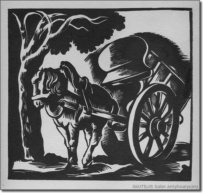 Koń z wózkiem, ok. 1925 Drzeworyt; wym.: 180 x 190 mm; nie sygn. Lit.: M. Grońska, Nowoczesny drzeworyt polski, Ossolineum 1971, s. 135, il. 76 (s. 136).